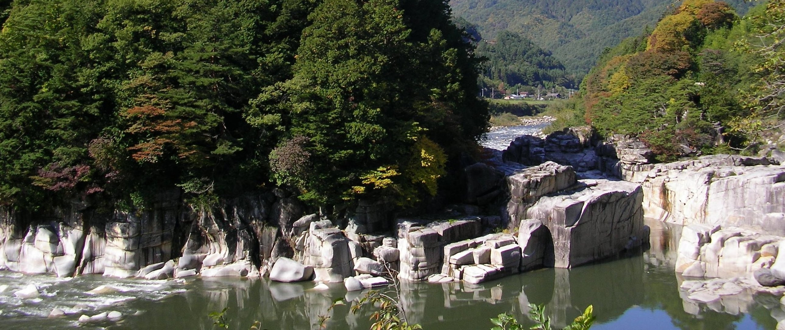 木曽川・寝覚の床（長野県上松町）を対岸から。2007年10月、投稿者撮影。